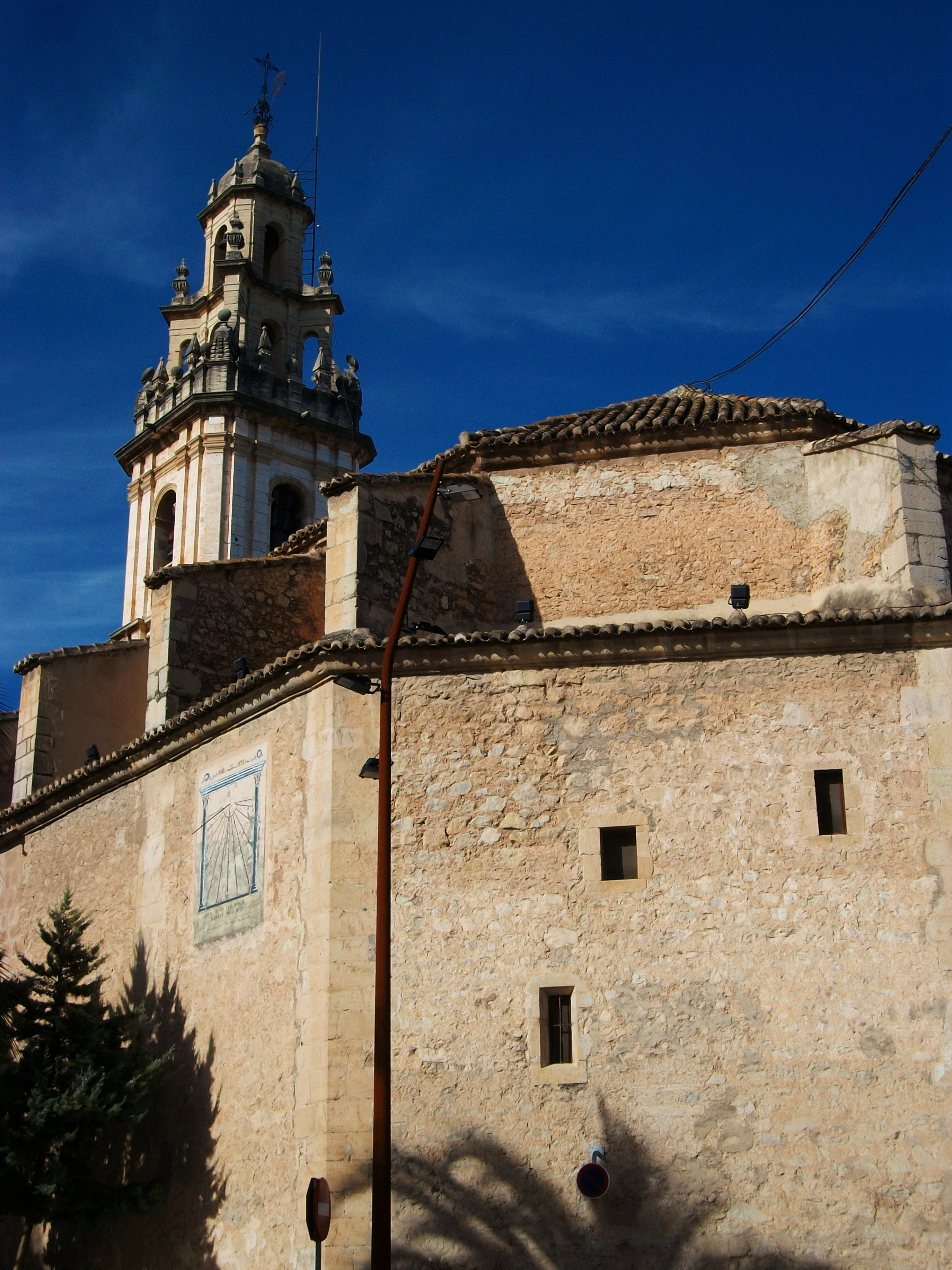 Església de l'Assumpció de Pego.